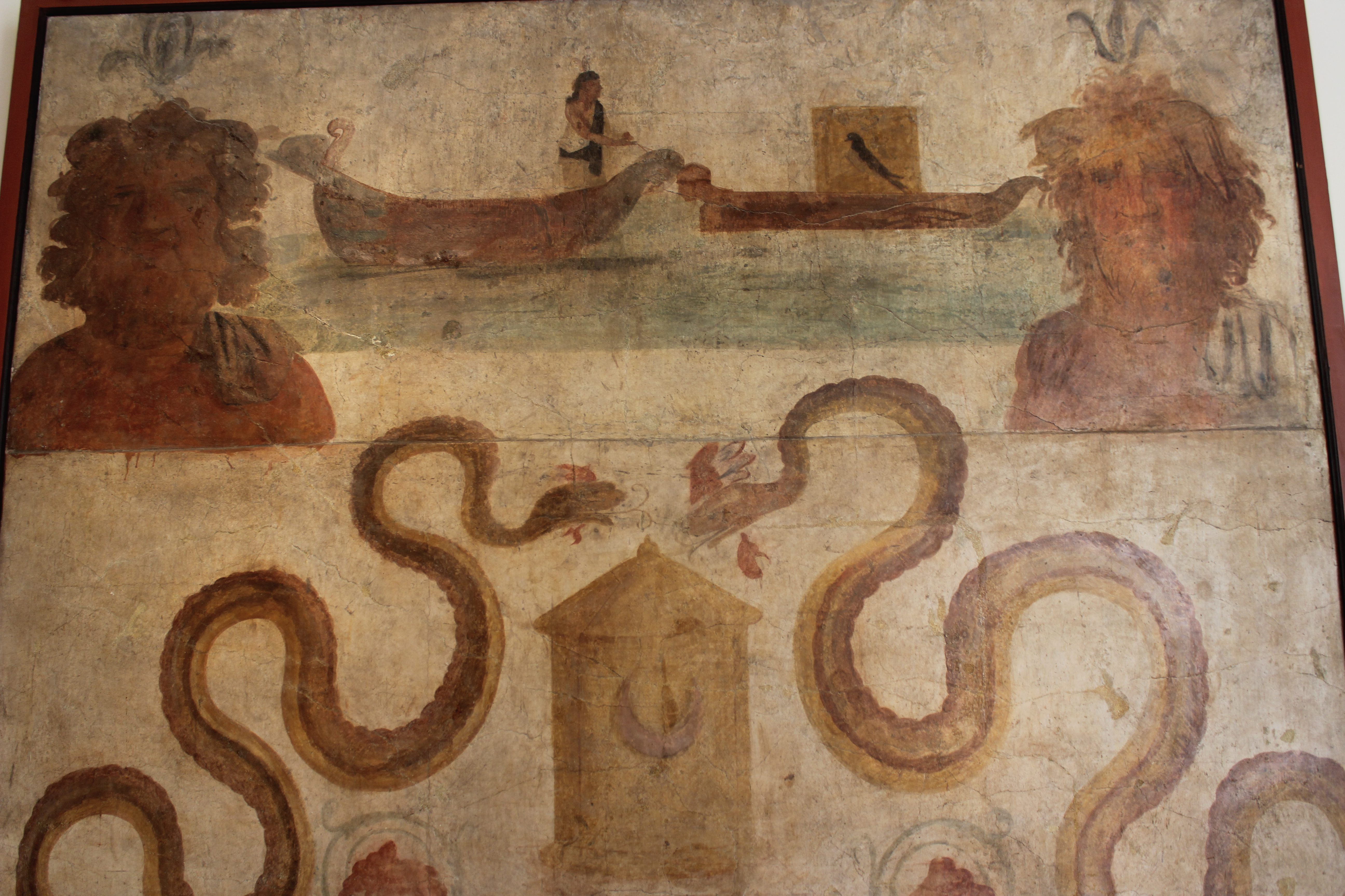 L'affresco con il Navigium Isidis, rinvenuto nel Sacrarium del Tempio di Iside a Pompei, è esposto nel Museo Archeologico Nazionale di Napoli (inv. 8929) (cat. 1.74). Fra due busti di divinità fluviali vi sono due imbarcazioni di giunchi, sulla sinistra delle quali vi è Iside che traina con una fune la barca di destra sulla quale vi è una cassa quadrata con un falco dipinto sopra. Al di sotto vi sono due grandi serpenti affrontati ai lati di una cesta di vimini con coperchio conico.